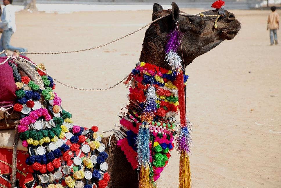 pushkar fair